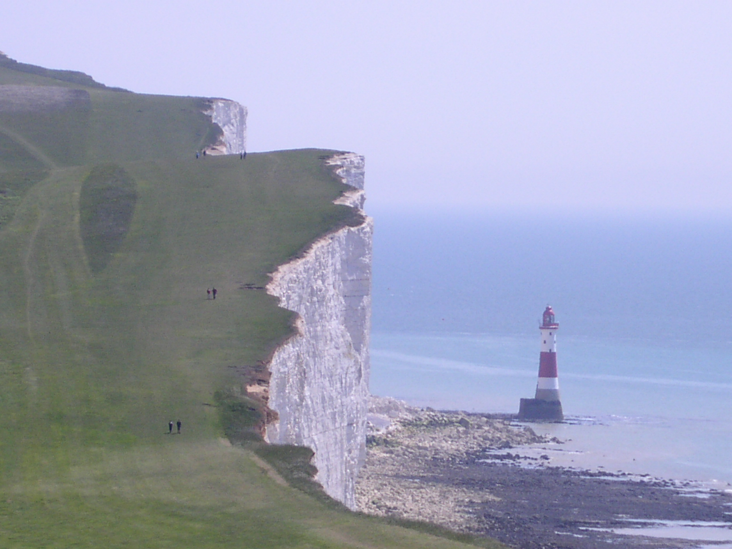 Dieses Bild zeigt die Klippen östlich der Seven Sisters in Richtung Beachy Head mit dem vorgelagerten Leuchtturm an der Südküste Englands in der Nähe von Brighton